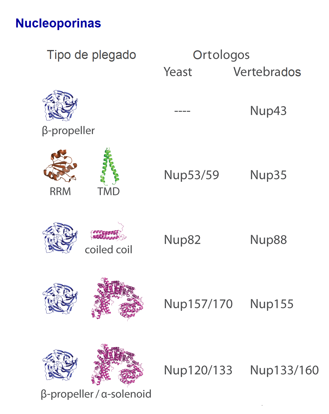 Fig. 1.C_ Captura de afinidad del NPC de tripanosoma e identificación de nuevas Nups.